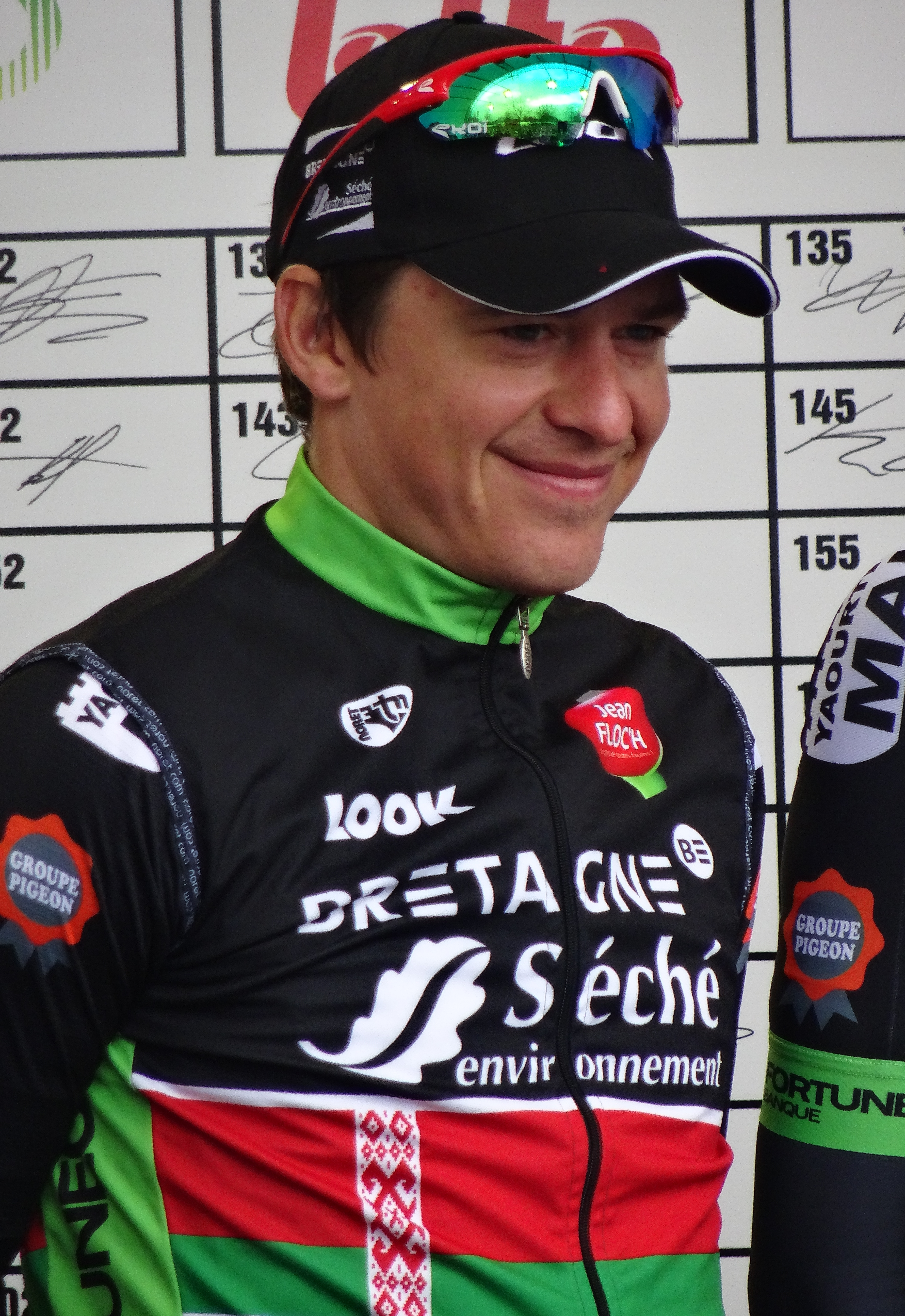 Reportage réalisé le dimanche 1er mars à l'occasion du départ et de l'arrivée de Kuurne-Bruxelles-Kuurne 2015 à Kuurne, Belgique.